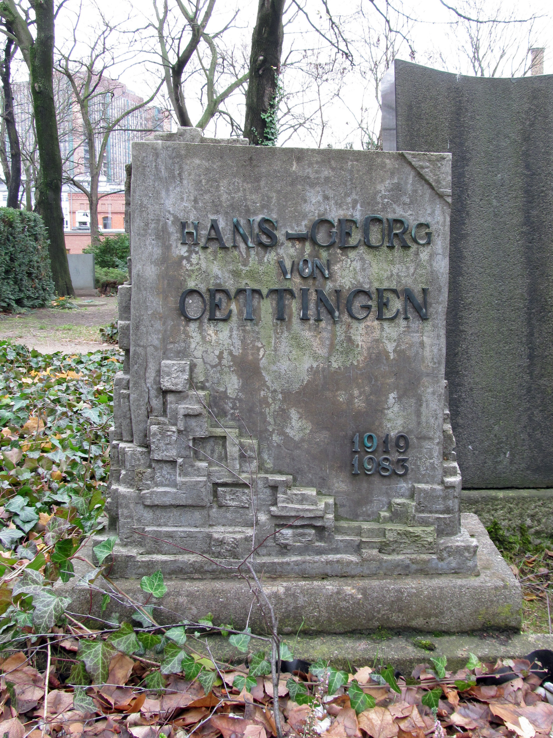 Grab von Hans von Oettingen auf dem Dorotheenstädtischen Kirchhof I in Berlin-Mitte